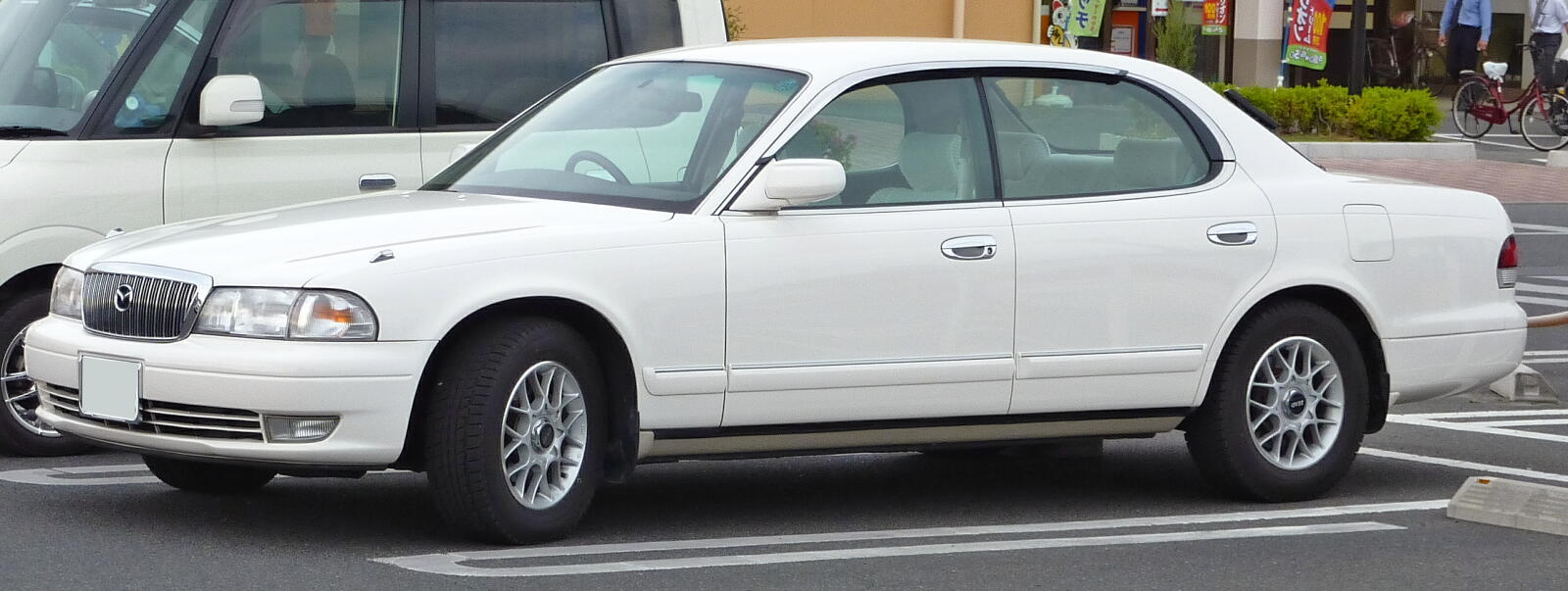 マツダ・センティア（2代目）